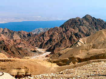 Farbiger Wüstensand und Bucht, Elat, Israel.